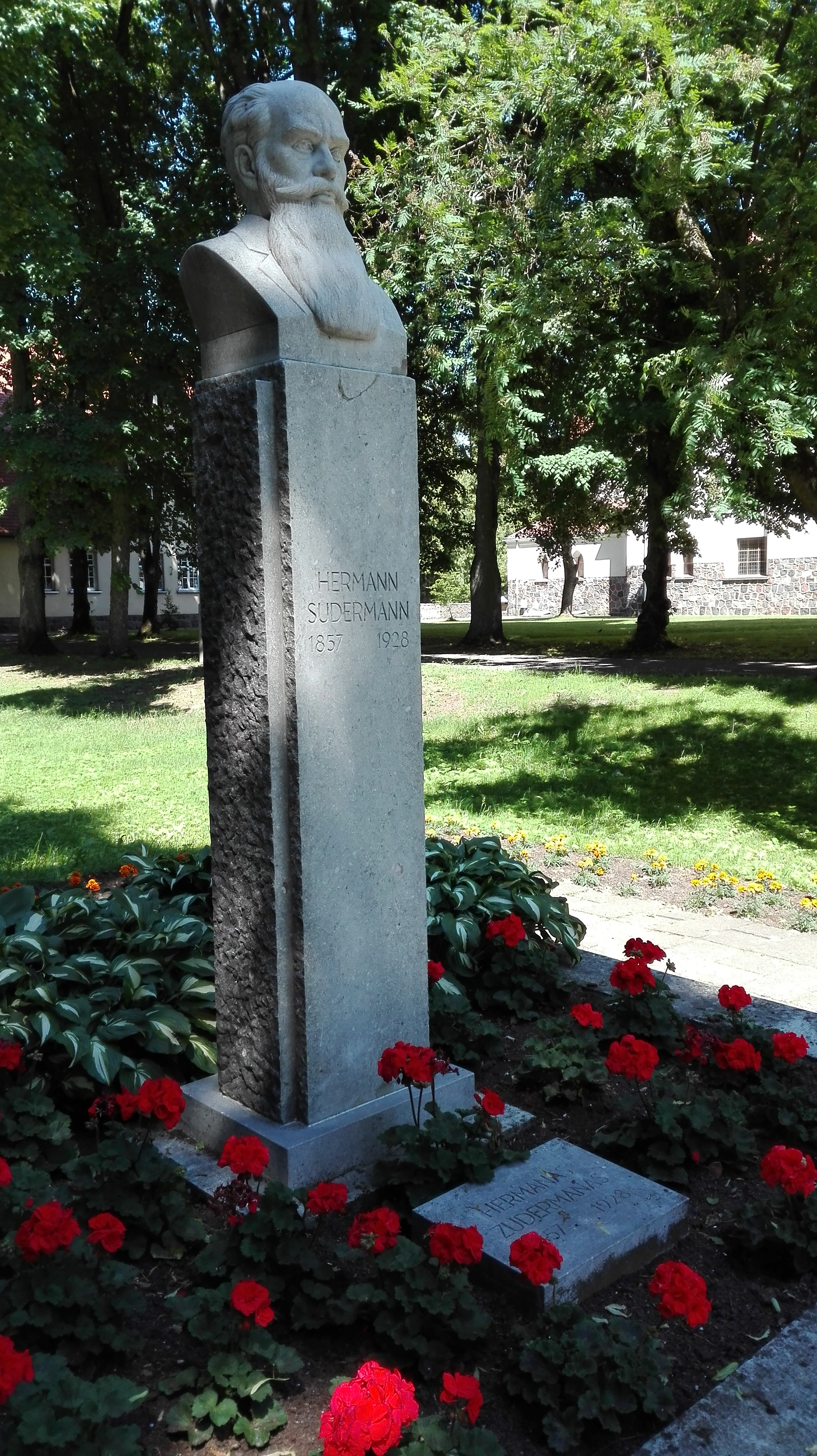 Paminklas Hermanui Zudermanui Šilutėje